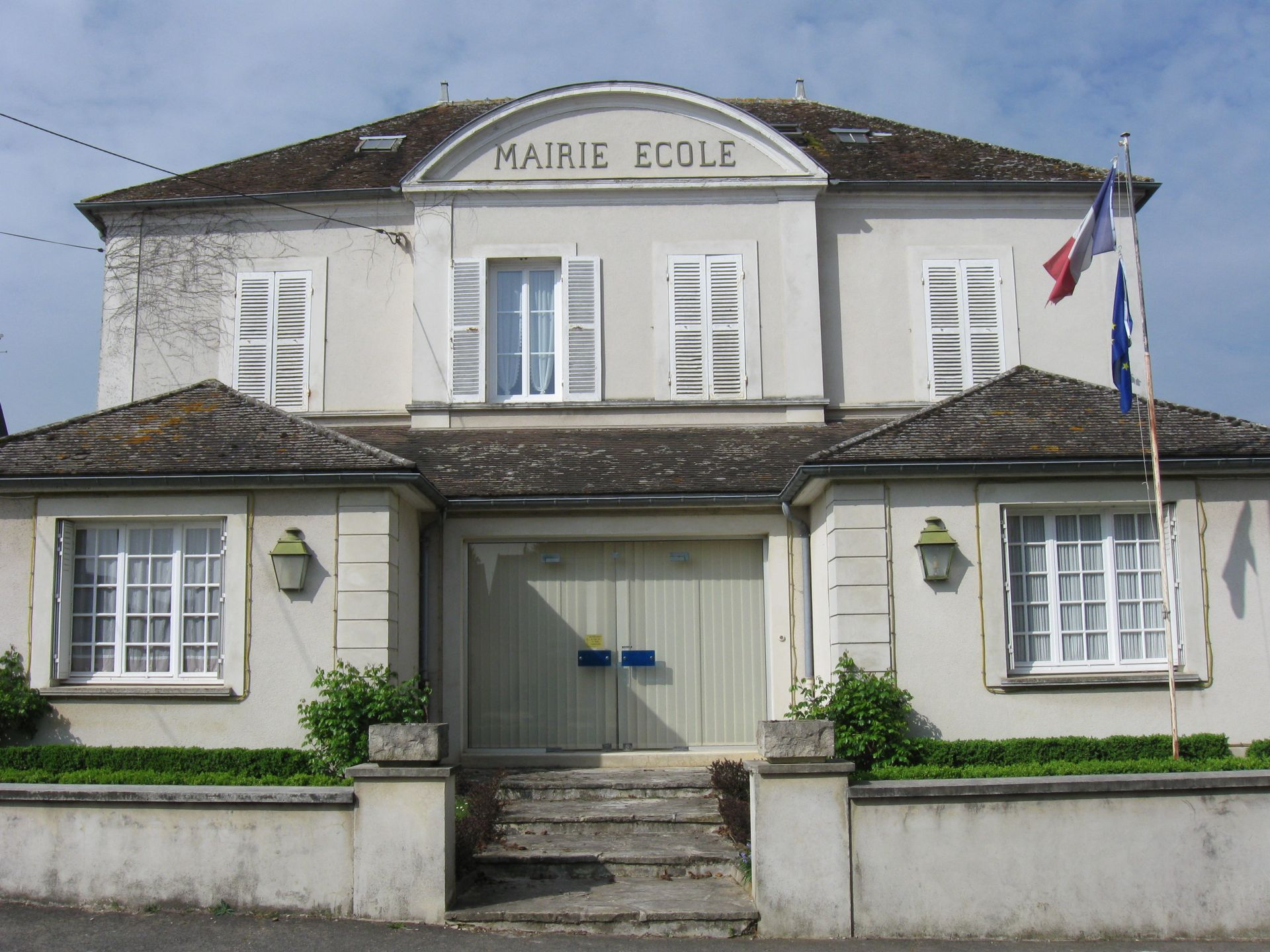 Mairie-école de Mousseaux-lès-Bray. (Seine-et-Marne, région Île-de-France).